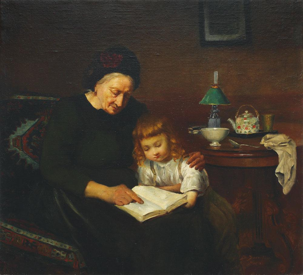 Dimitrie Serafim (1862-1931) - Povestea de seară, ulei pe pânză, 50x55 cm, semnat și localizat dreapta jos, cu ocru, D.Serafim, Paris.